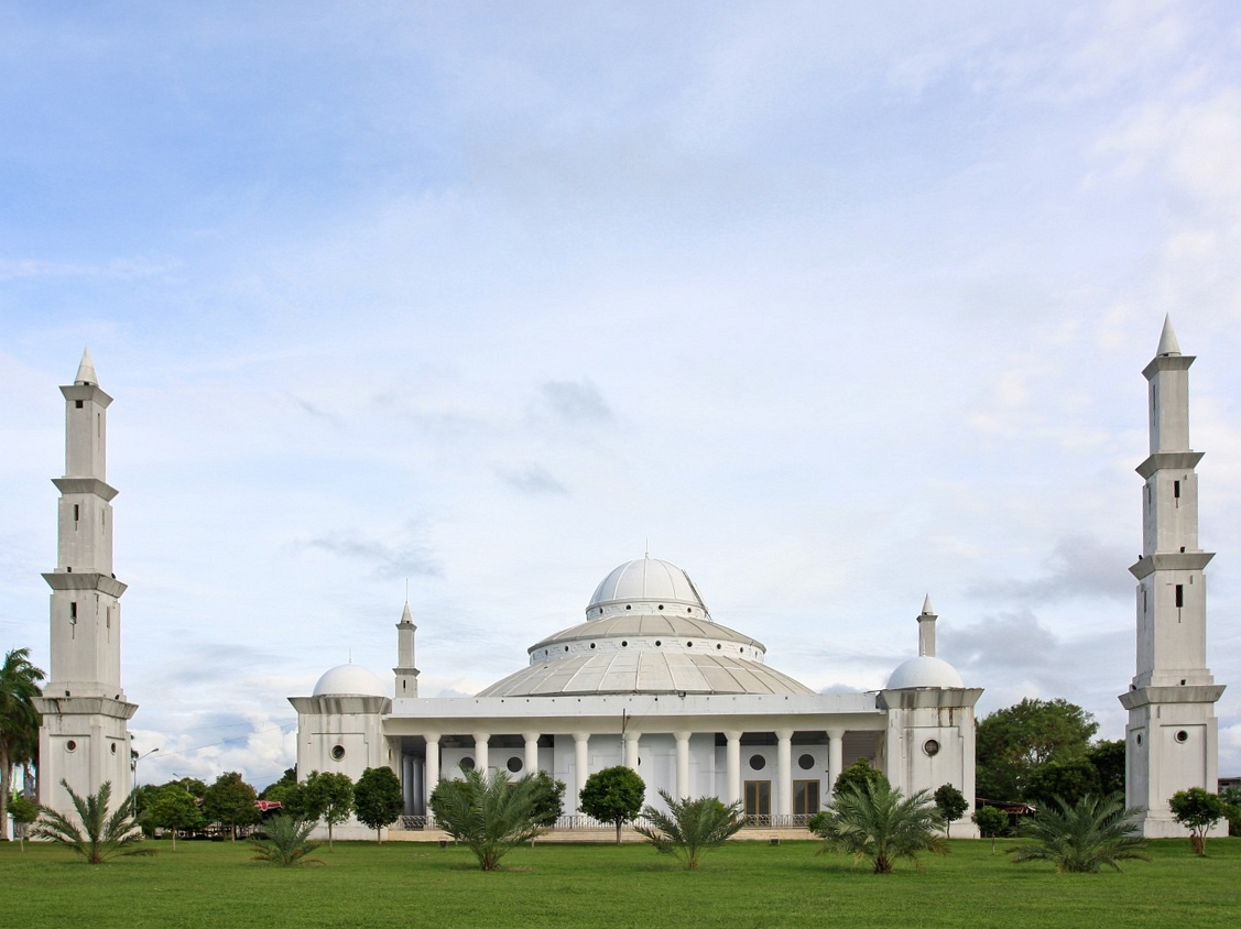 Masjid Agung Bengkulu